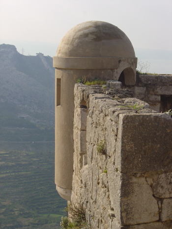 Detalj Kliške tvrđave.